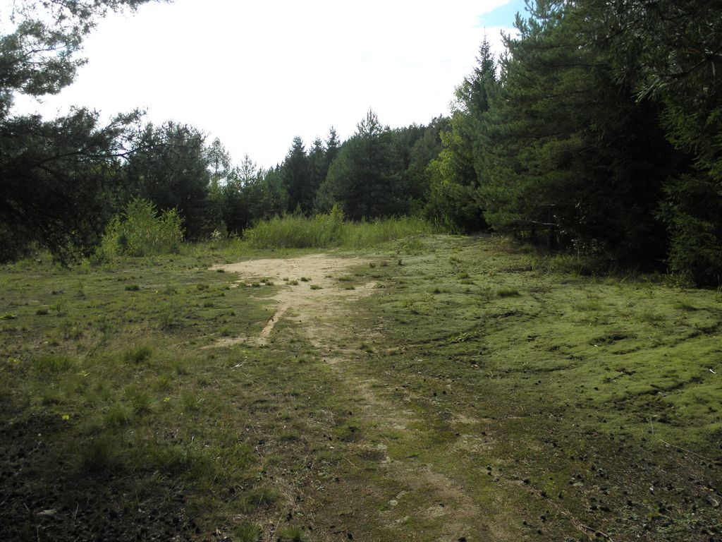 PP Roudný